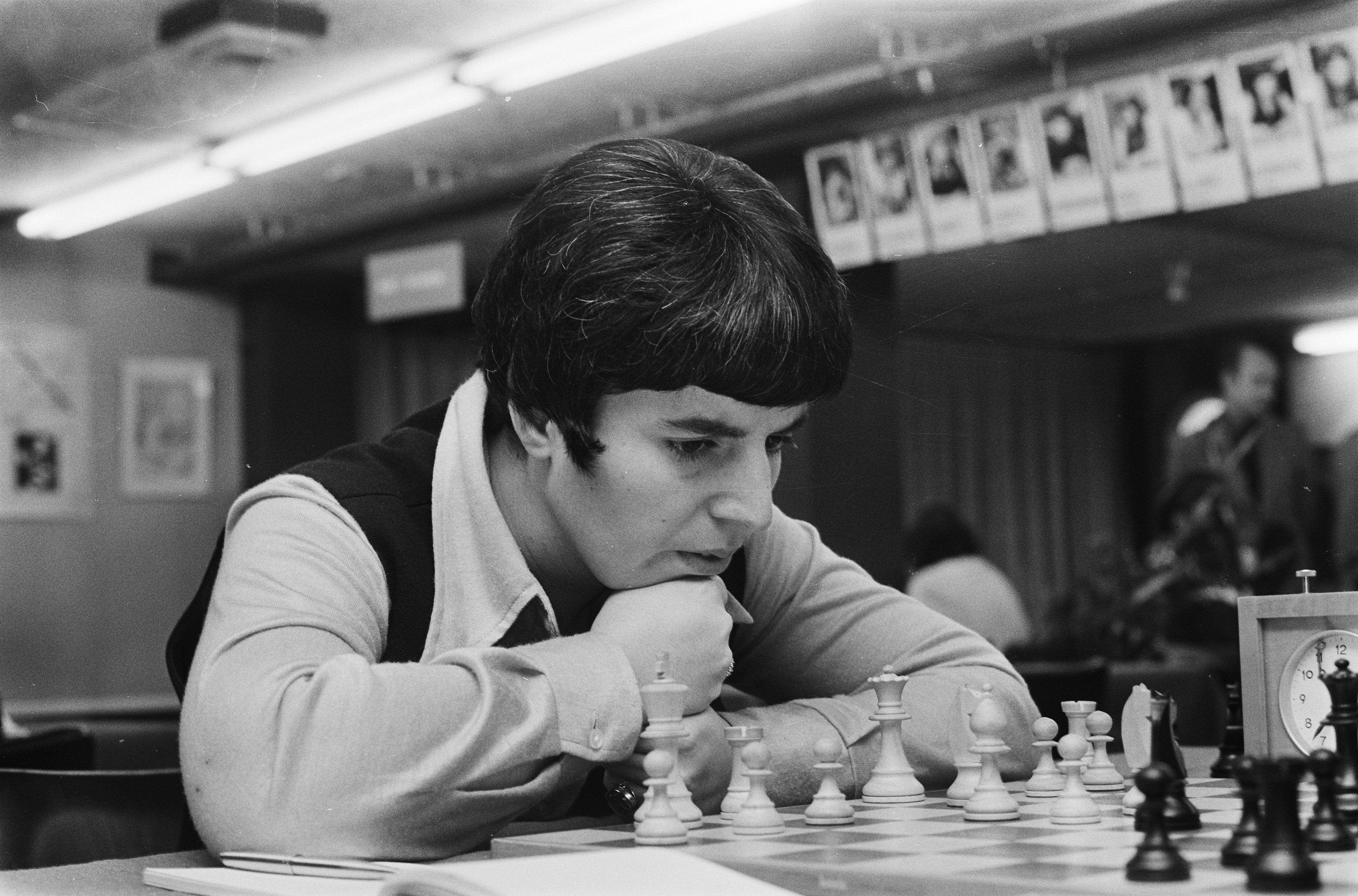 Collectie / Archief : Fotocollectie Anefo Reportage / Serie : [ onbekend ] Beschrijving : Hoogovenschaaktoernooi; nr. 34a Russin Gaprindashvili (heeft leiding bij dames) Datum : 30 januari 1975 Trefwoorden : schaken Instellingsnaam : Hoogovenschaaktournooi Fotograaf : Peters, Hans / Anefo Auteursrechthebbende : Nationaal Archief Materiaalsoort : Negatief (zwart/wit) Nummer archiefinventaris : bekijk toegang 2.24.01.05 Bestanddeelnummer : 927-7230